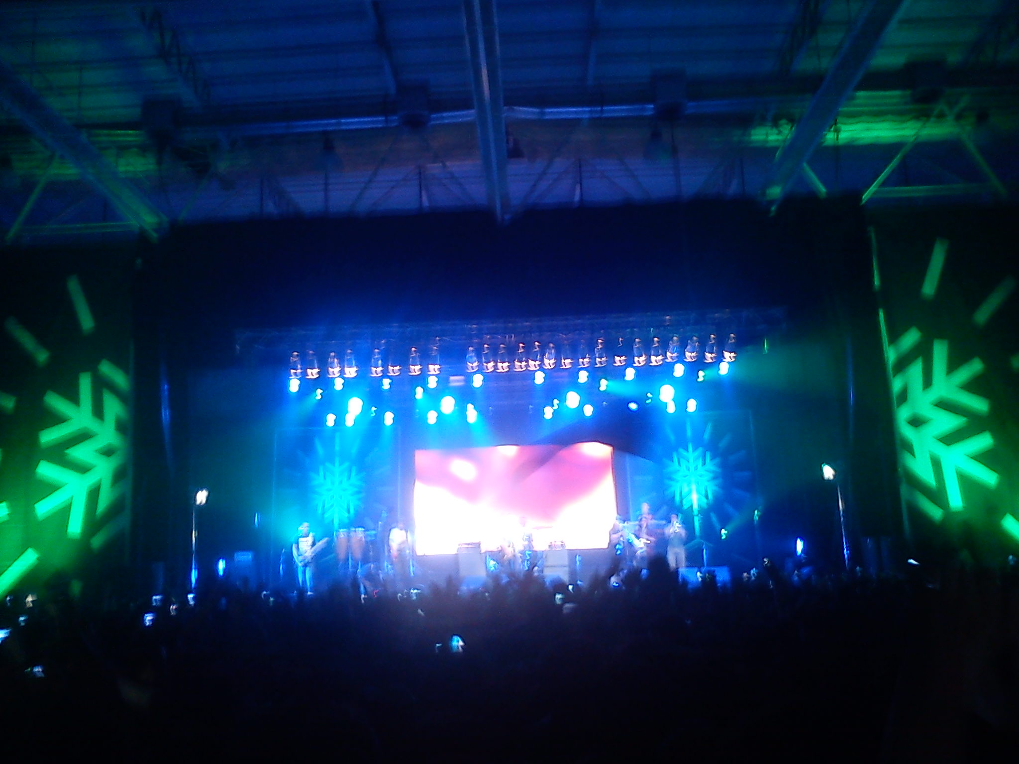 NTVG en comodoro